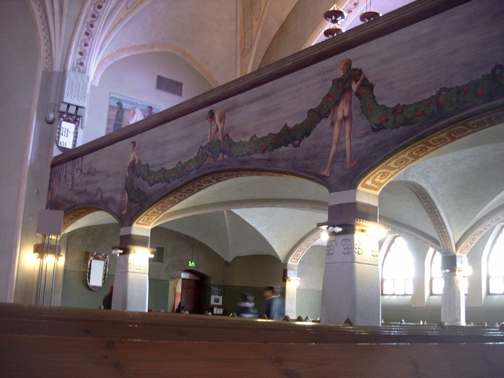 Tampere, Kathedrale, Gemälde an Galerie